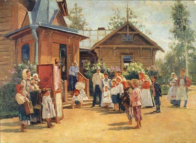 В. Е.Маковский. "Кукольный театр в деревне", 1908